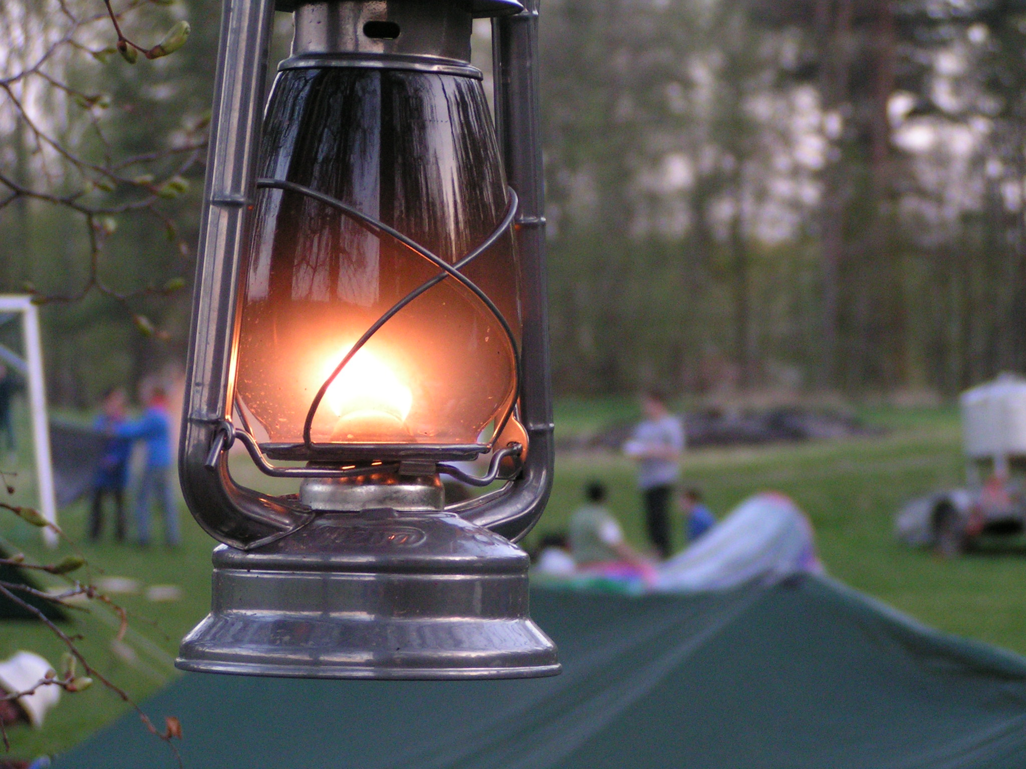 Fotogenlampa.